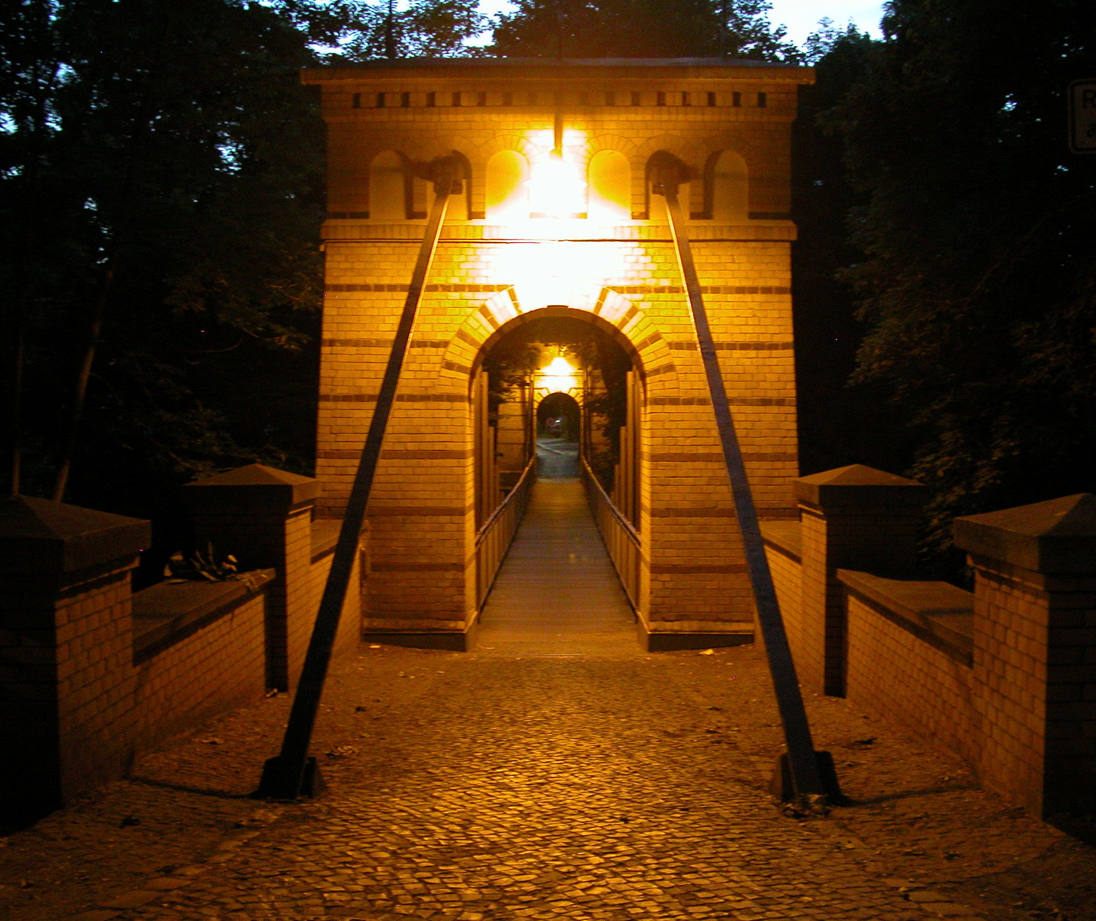 Braunschweig, Rosentalbrücke: Spät Abends.